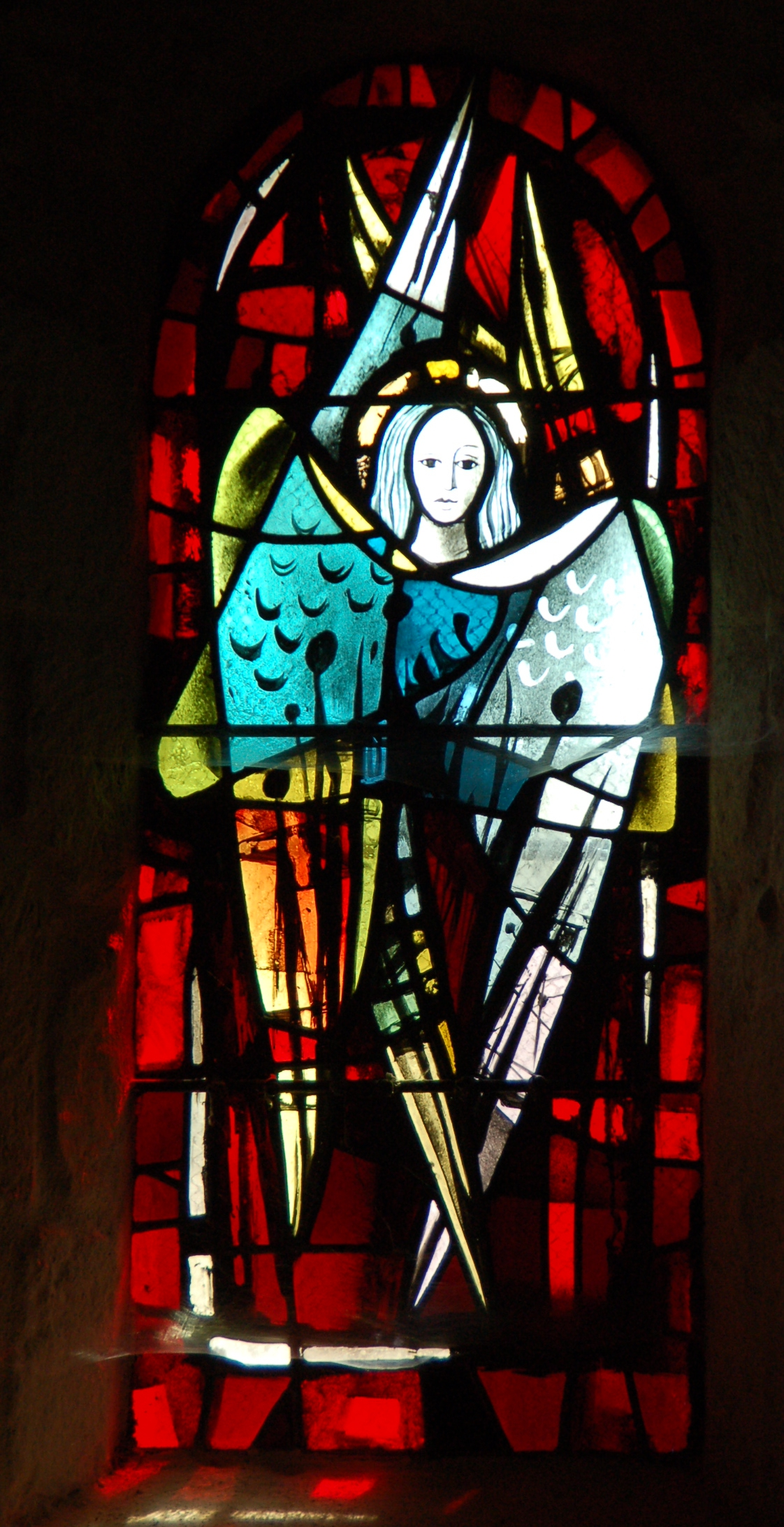 Ste Marie-Madleine Kirchenfenster